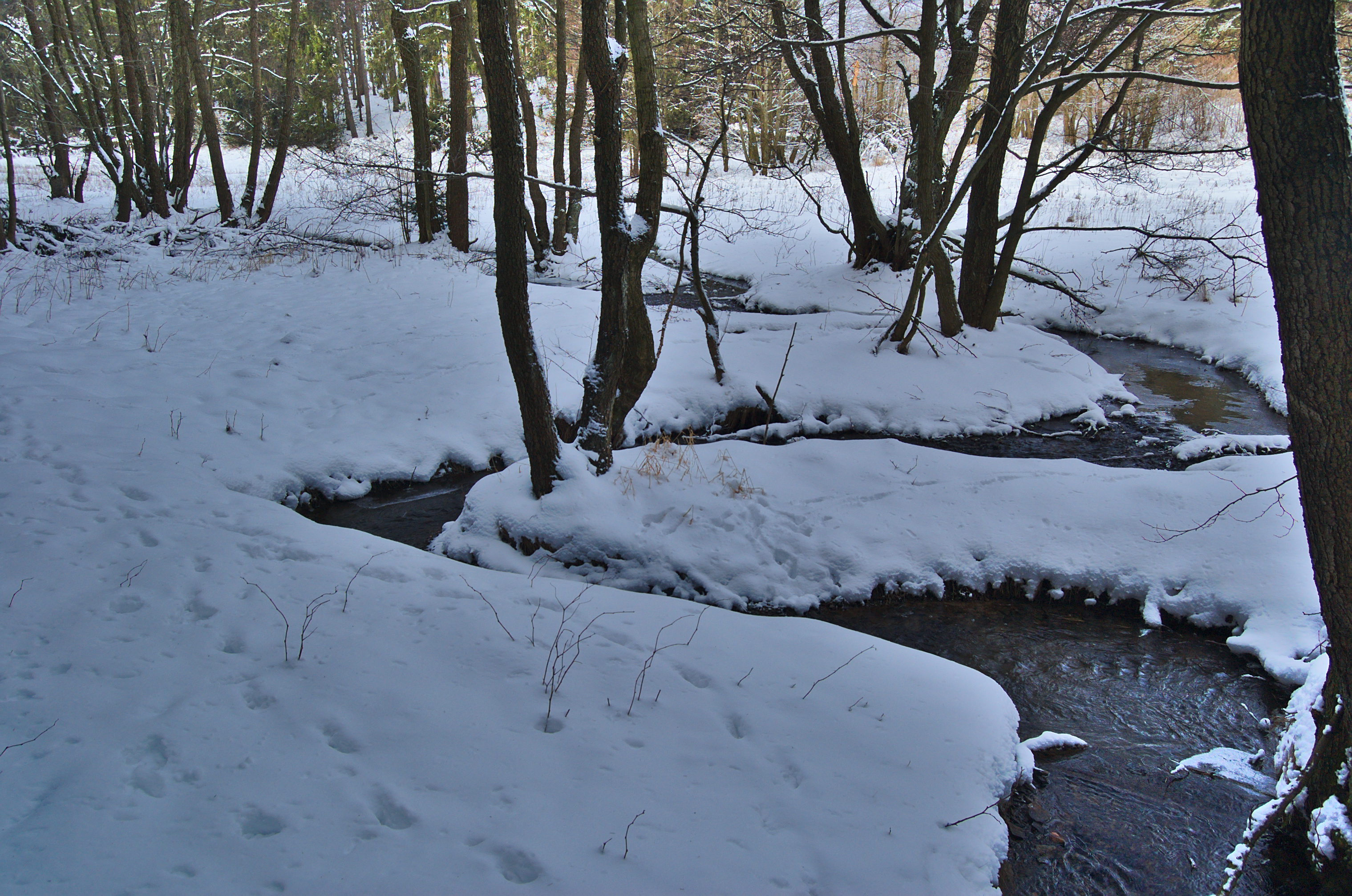 Horní tok Hloučely, Lipová, okres Prostějov